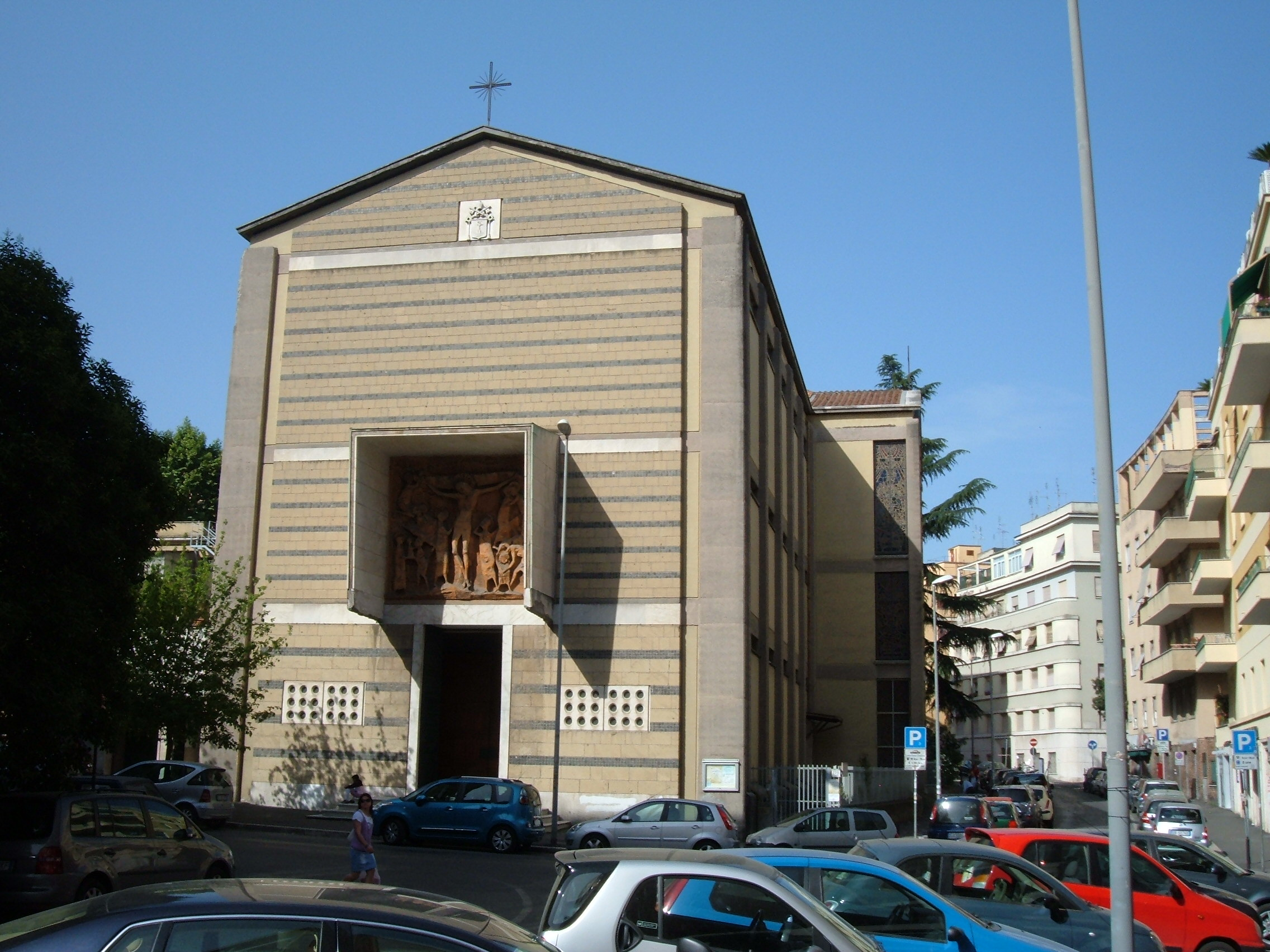 Chiesa dei Sacri Cuori di Gesù e Maria, a Roma, nel quartiere Trieste.